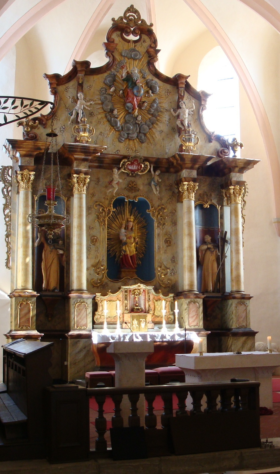 Altar der Adlersberger Kirche, Muttergottes in der Verlassenheit, ehemalige Klosterkirche Adlersberg